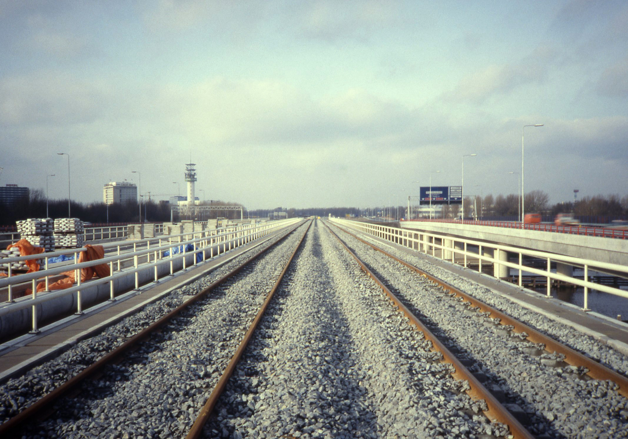 De in aanbouw zijnde Amstelveenlijn op de Rozenoordmetrobrug richting RAI over de Amstel. Links de in aanbouw zijnde Schiphollijn naar Weesp.